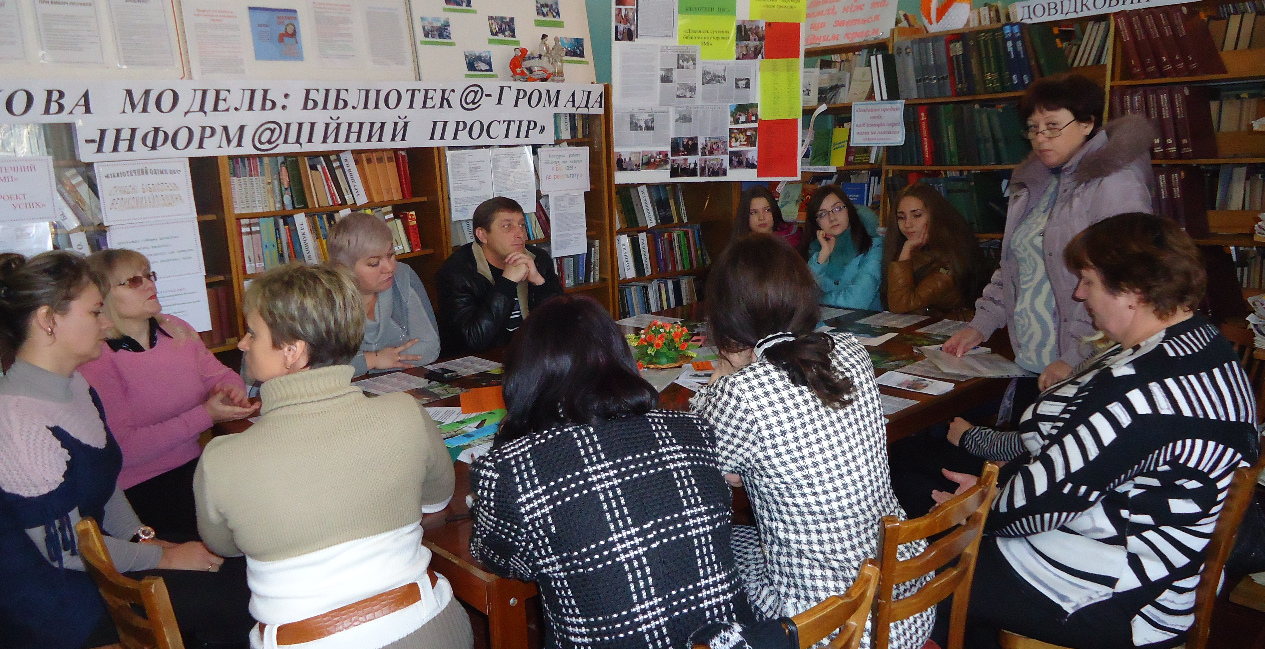 Засідання круглого столу в центральній районній бібліотеці за участю голів громад